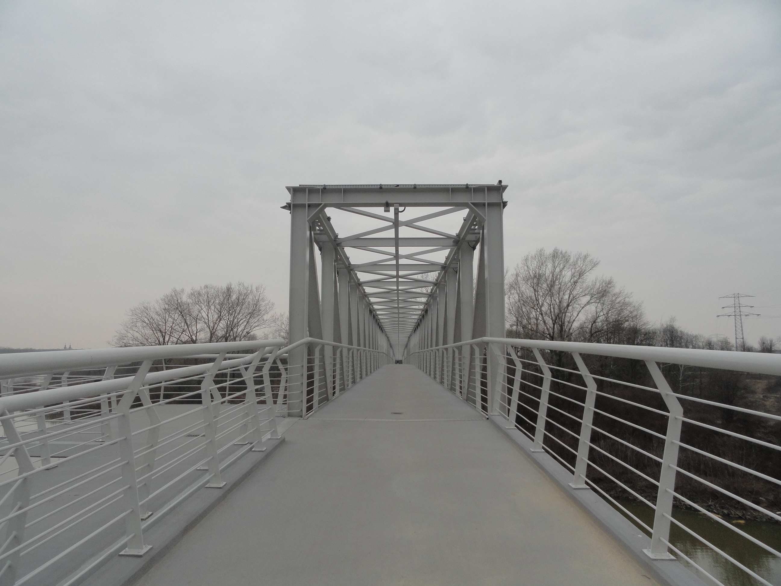 Kładka nad kanałem Żerańskim w Warszawie, przebudowana na część nadwiślańskiej trasy pieszo-rowerowej.